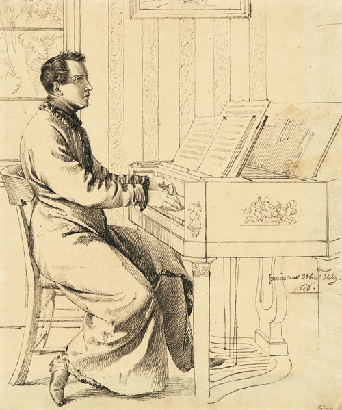 Mann in mittleren Jahren am Klavier sitzend (ink drawing, 25 x 20,9 cm)